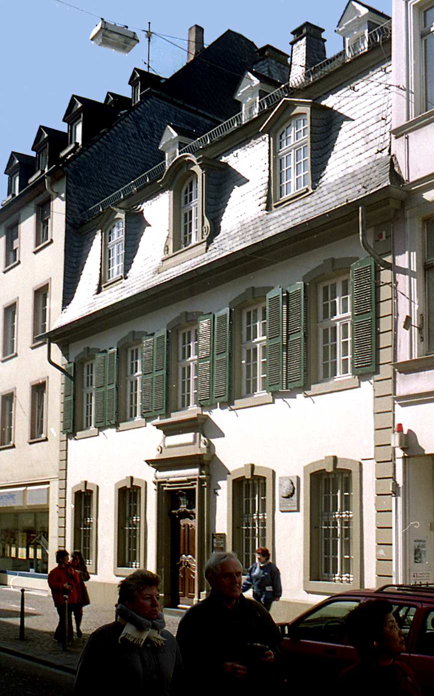 Трир. Дом,в котором родился Маркс.